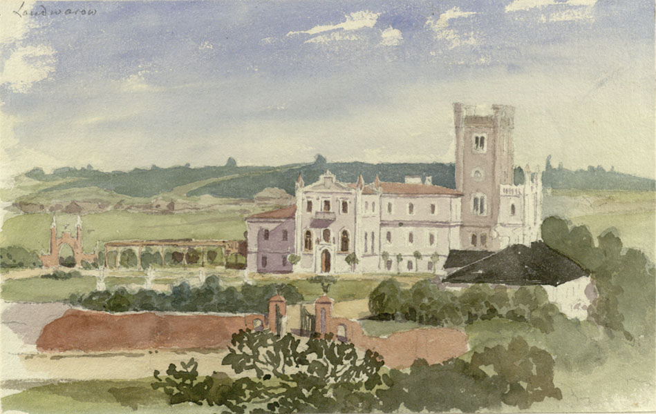 Беларуская (тарашкевіца): Ляндварова